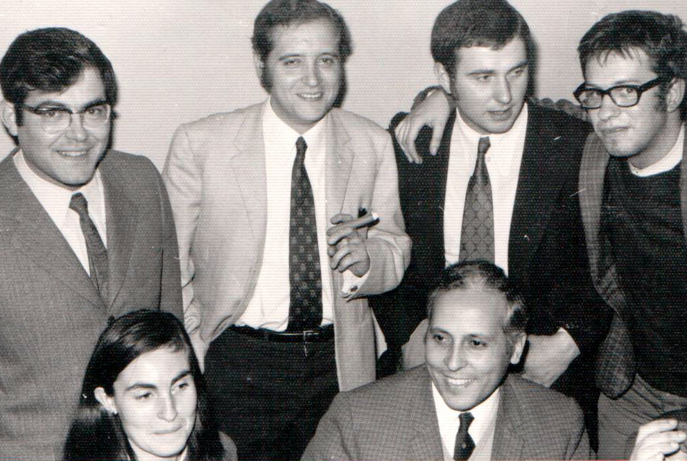 Profesores del Departamento de Física Teórica, Universidad de Valladolid, 1972